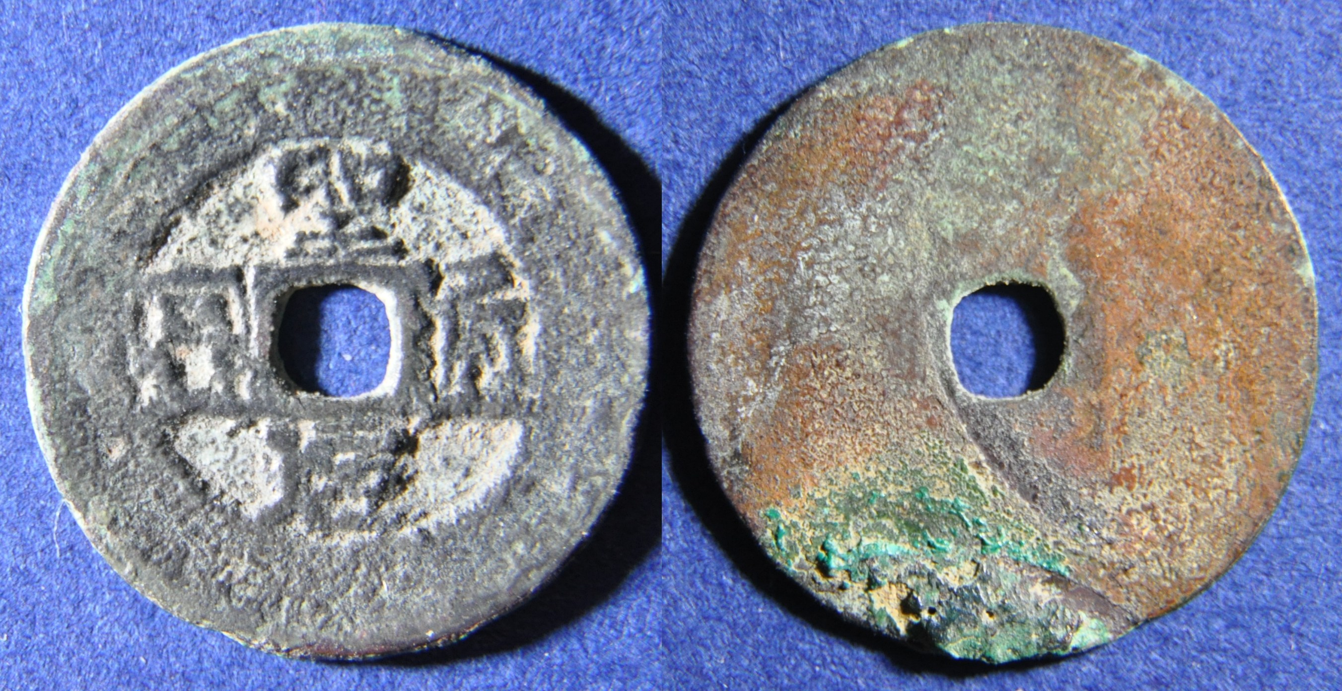 Une monnaie en cuivre d’une sapèque de Ho Quy Ly (1336-1407), ère Thanh Nguyen (1400-1401), de la dynastie des Ho (1400-1407). A/ Thanh Nguyen thong bao (Monnaie courante de l’ère Thanh Nguyen) R/ vide Dimension : 20,03 mm Poids : 1,3 g. Cuivre Remarque : Ho Quy Ly est un mandarin et un général du Dai Viet. En 1380, il remporte une victoire face au royaume du Champa ce qui lui permet de commander toute l’armée. En 1400, il dépose le dernier empereur de la dynastie Tran, Tran Thieu De. Auparavant en 1398, il avait poussé le père de cet empereur, Tran Thuan Tong, à abdiquer en faveur de son fils avant de le faire exécuter. En 1400, il se proclame empereur mais abdique en faveur de son fils en 1401. Références : Toda 30 Indice de rareté : Peu commune ?